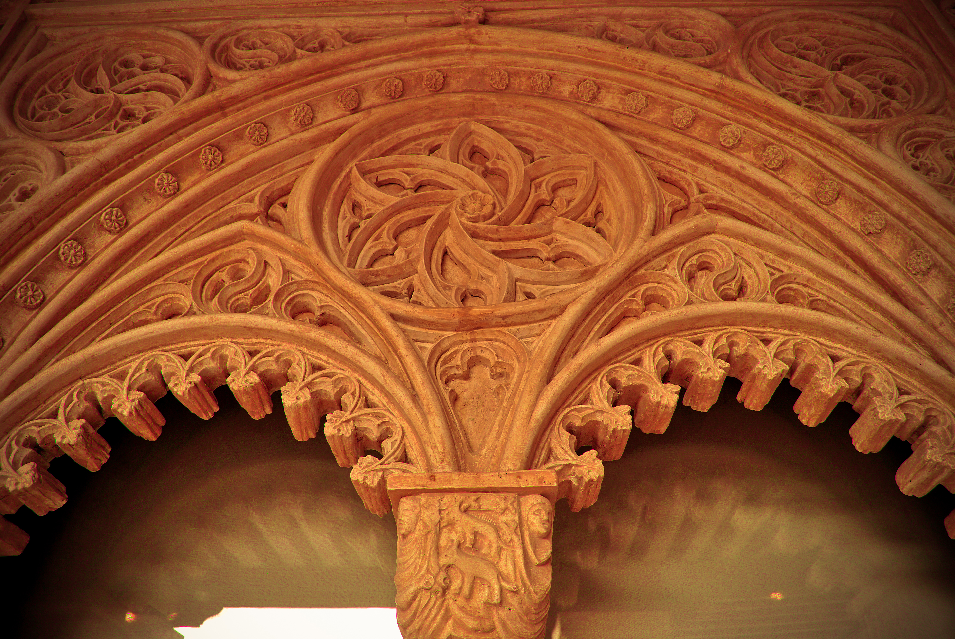 Palacio de Fuensalida.